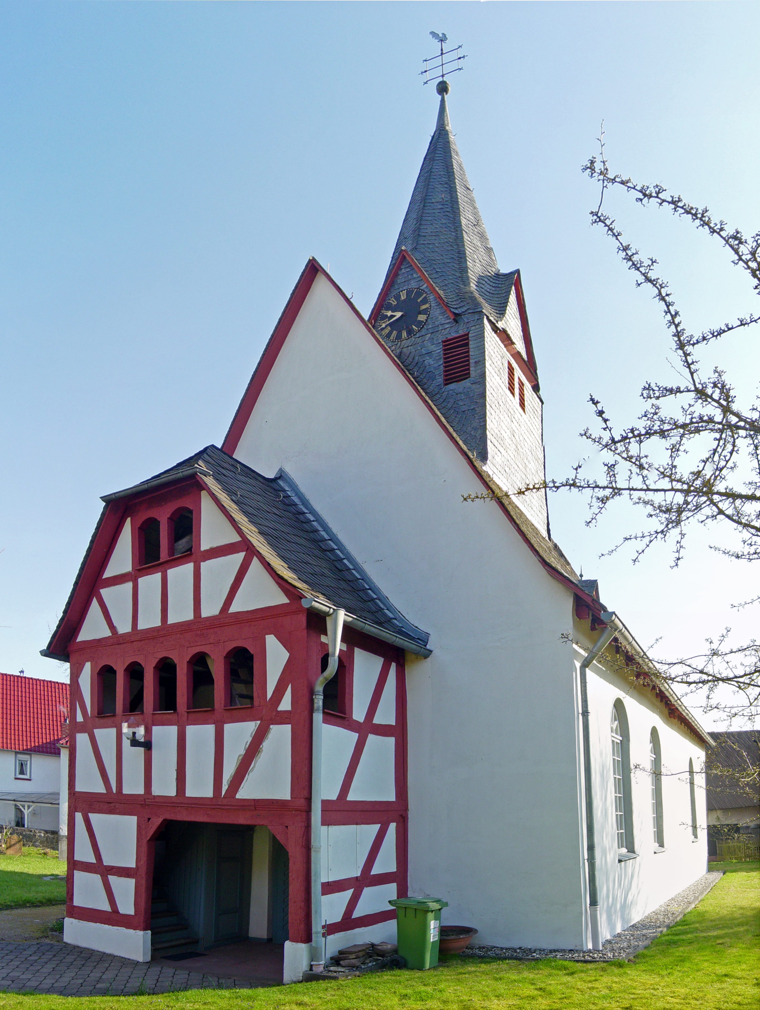 Ev. Kirche in Dornholzhausen, Südansicht, stitched